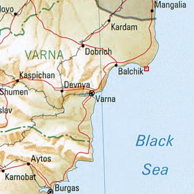 Kap Kaliakra - Lage in Bulgarien